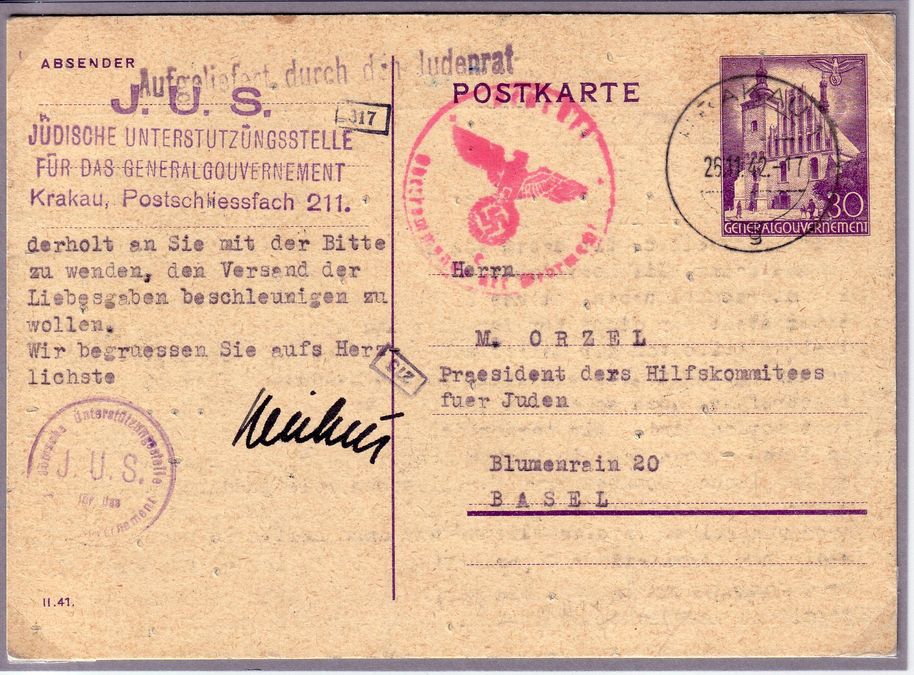 Postkarte der Deutschen Reichspost Generalgouvernement vom November 1942 Dienststempel "Ausgeliefert durch den Judenrat" Zensurstempel "Oberkommando der Wehrmacht" Poststempel "Krakau" vom 25.11.1942